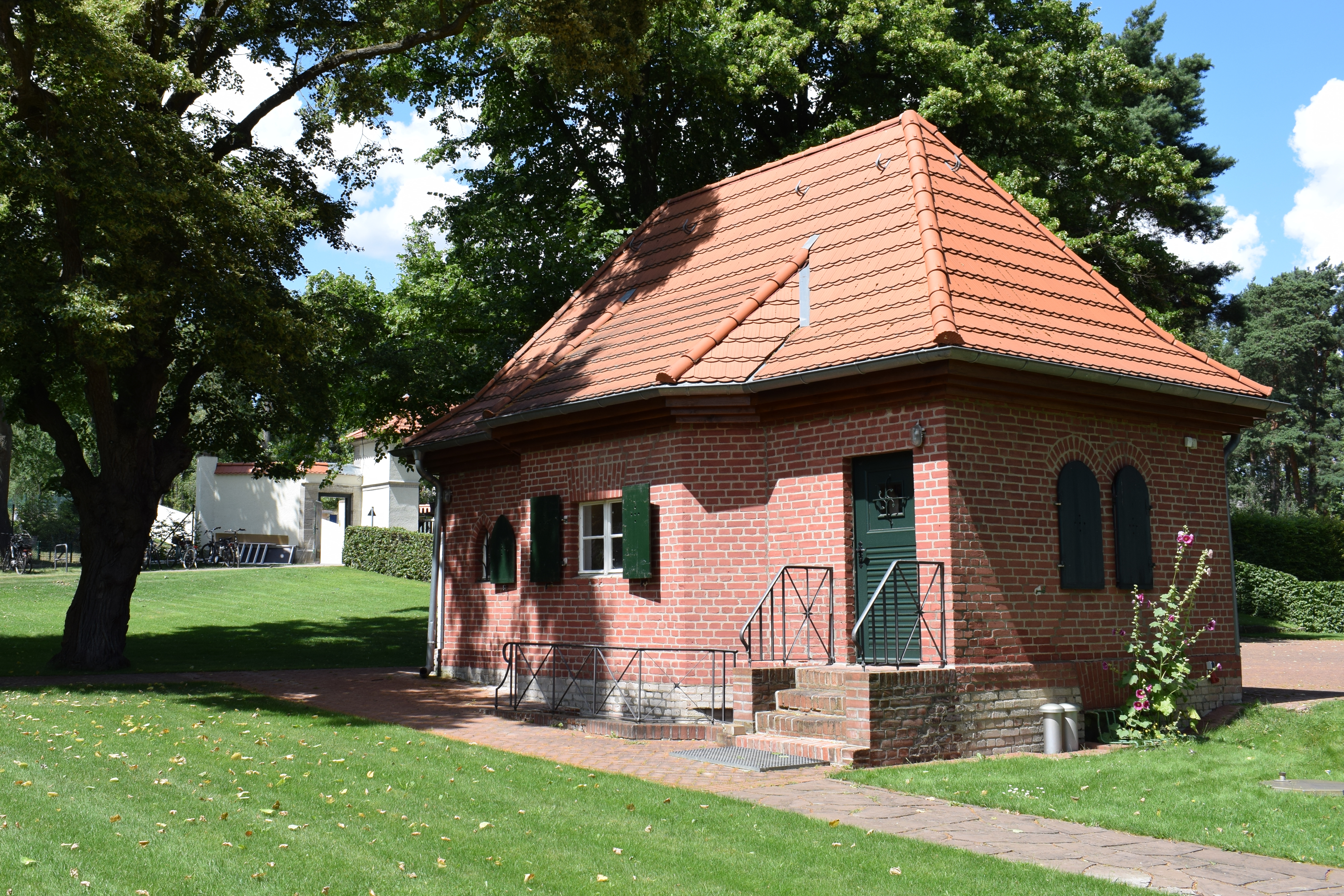 Berlin-Kladow, Am Schwemmhorn 1. Chauffeurhaus des ehem. Landhauses Fränkel.